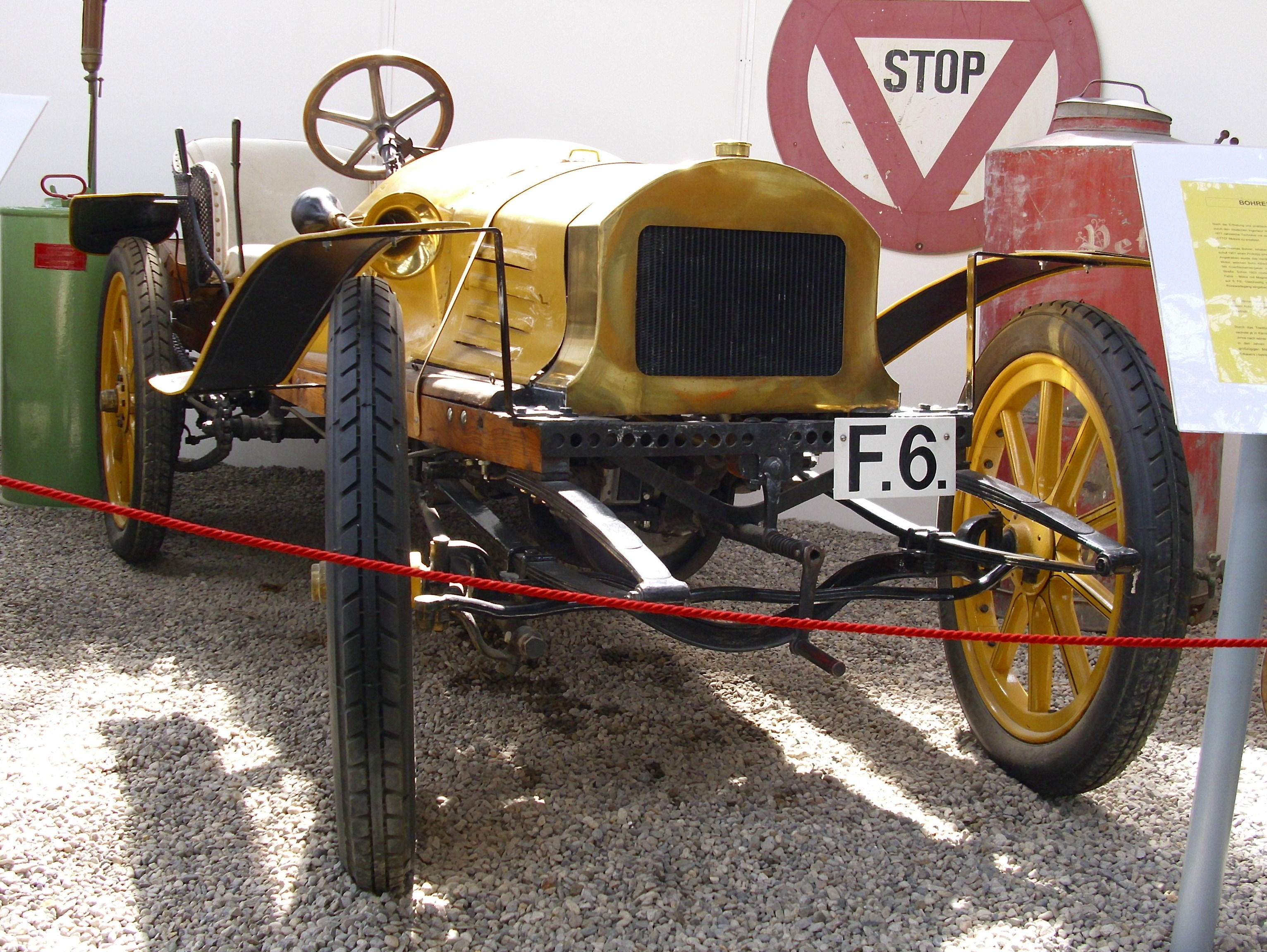 Bohrer von 1901 im Historama Ferlach